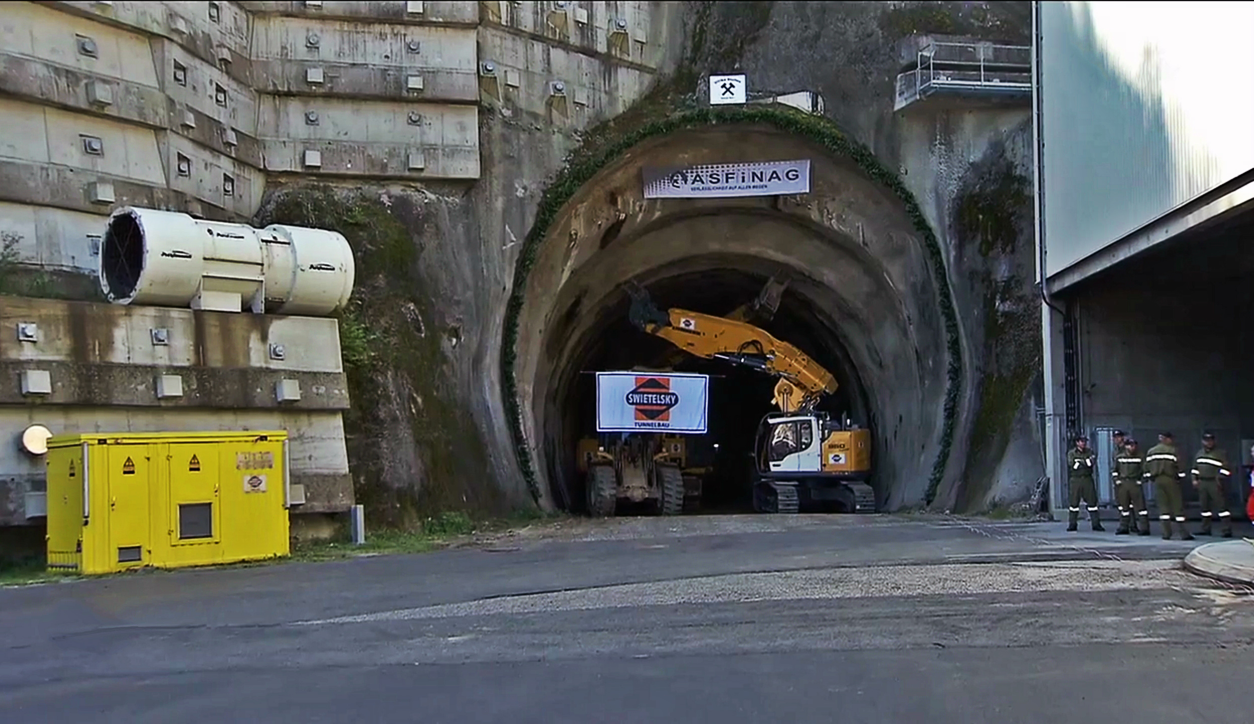 Tunnelanstich Karawankentunnel Nordportal Österreich 18.09.2018